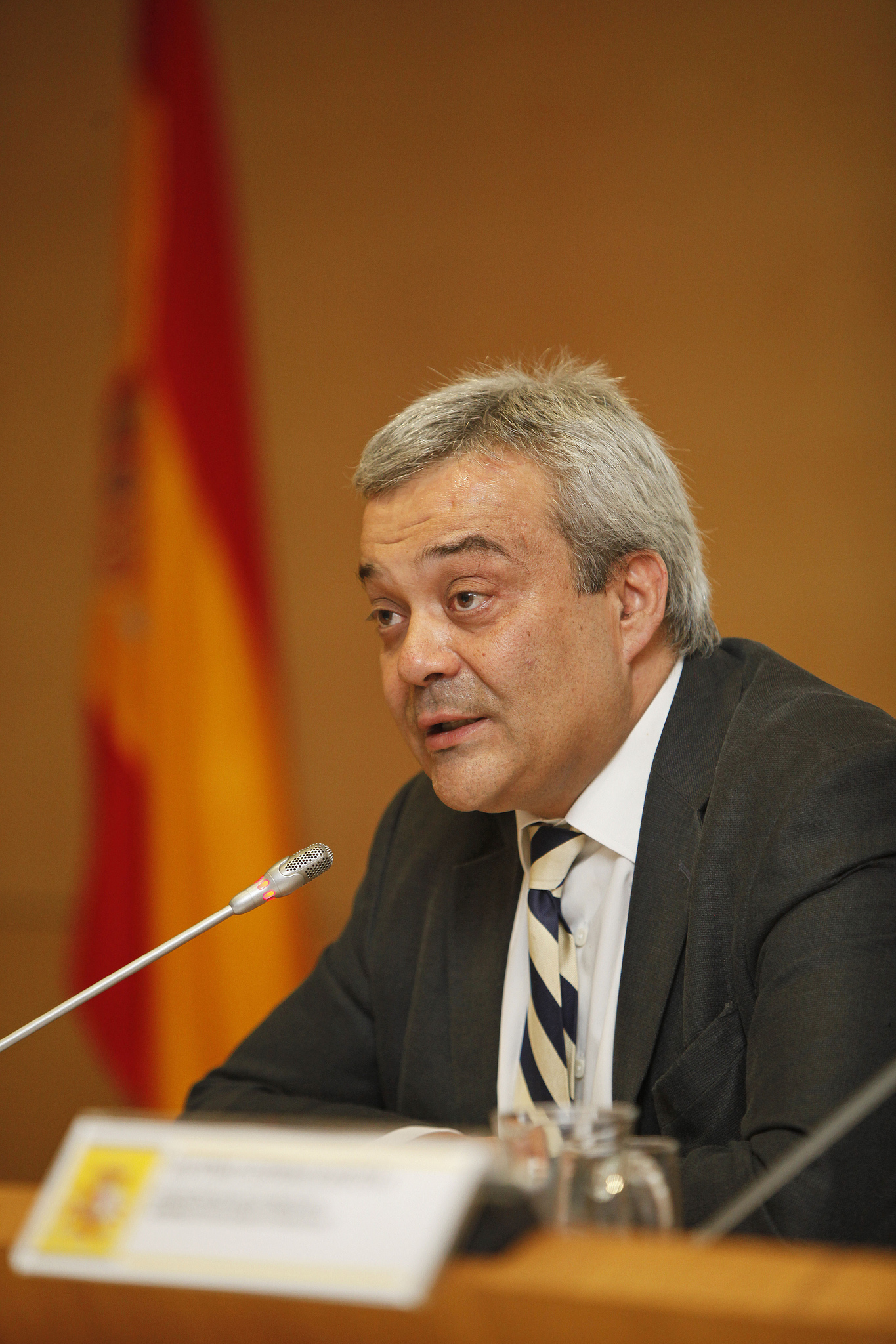 Encuentro Aporta: iniciativas Open Data en España. Edición 2012. VIctor Calvo-Sotelo (izquierda), secretario de Estado de Telecomunicaciones y para la Sociedad de la Información (Ministerio de Industria, Energía y Turrismo).